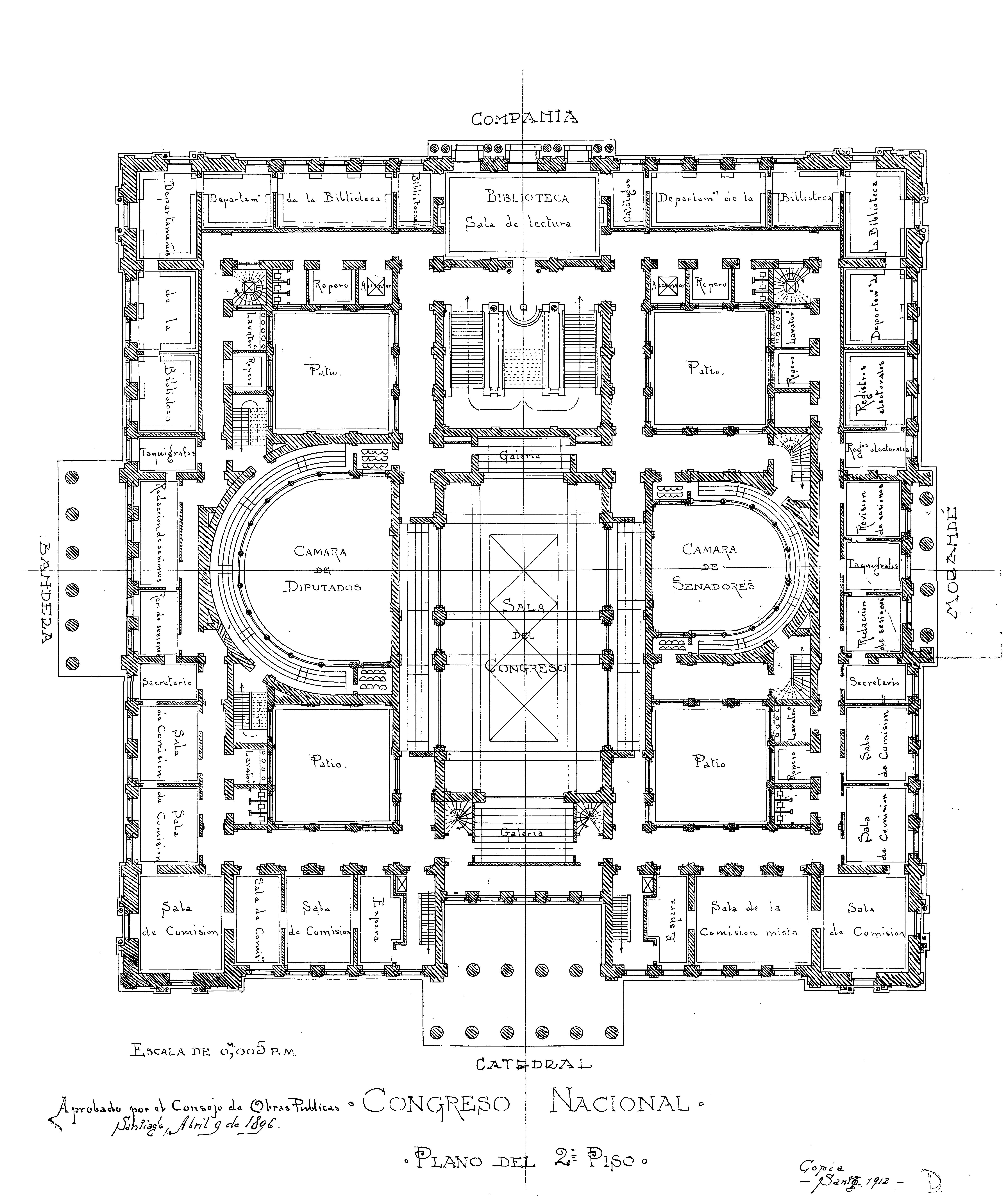 Copia del plano del segundo piso del Congreso Nacional, sede Santiago, donde aparecen la ubicación histórica de la Biblioteca del Congreso Nacional, el que fue aprobado por el Consejo de Obras Públicas, Santiago, abril de 1896. Data de 1912, escala de 0.005 p.m.